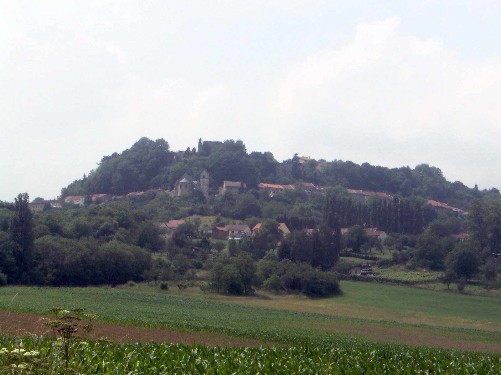 Prény Meurthe-et-Moselle Vue générale